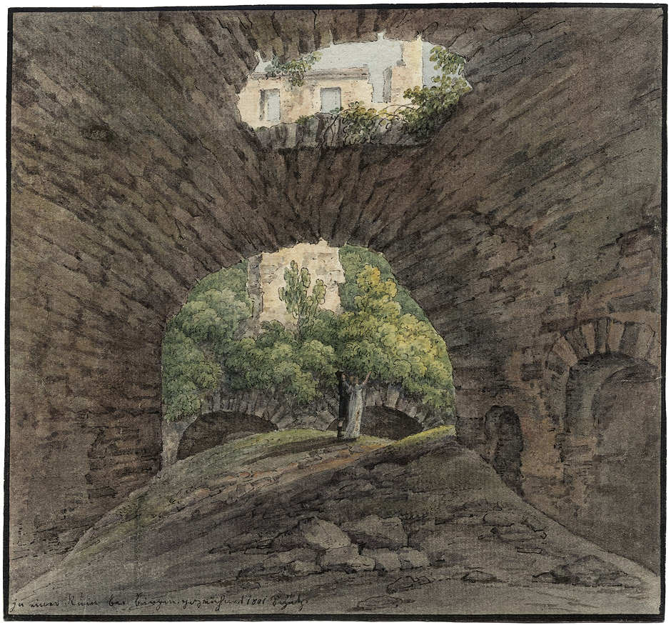 Christian Georg Schüz d. J.: Ein junges Paar besichtigt Ruinen in Bingen. Aquarell über Feder in Schwarz. 16,4 x 17,8 cm. Unten links bezeichnet, datiert und signiert "in einer Ruine bei Bingen. gezeichnet 1801 Schütz".